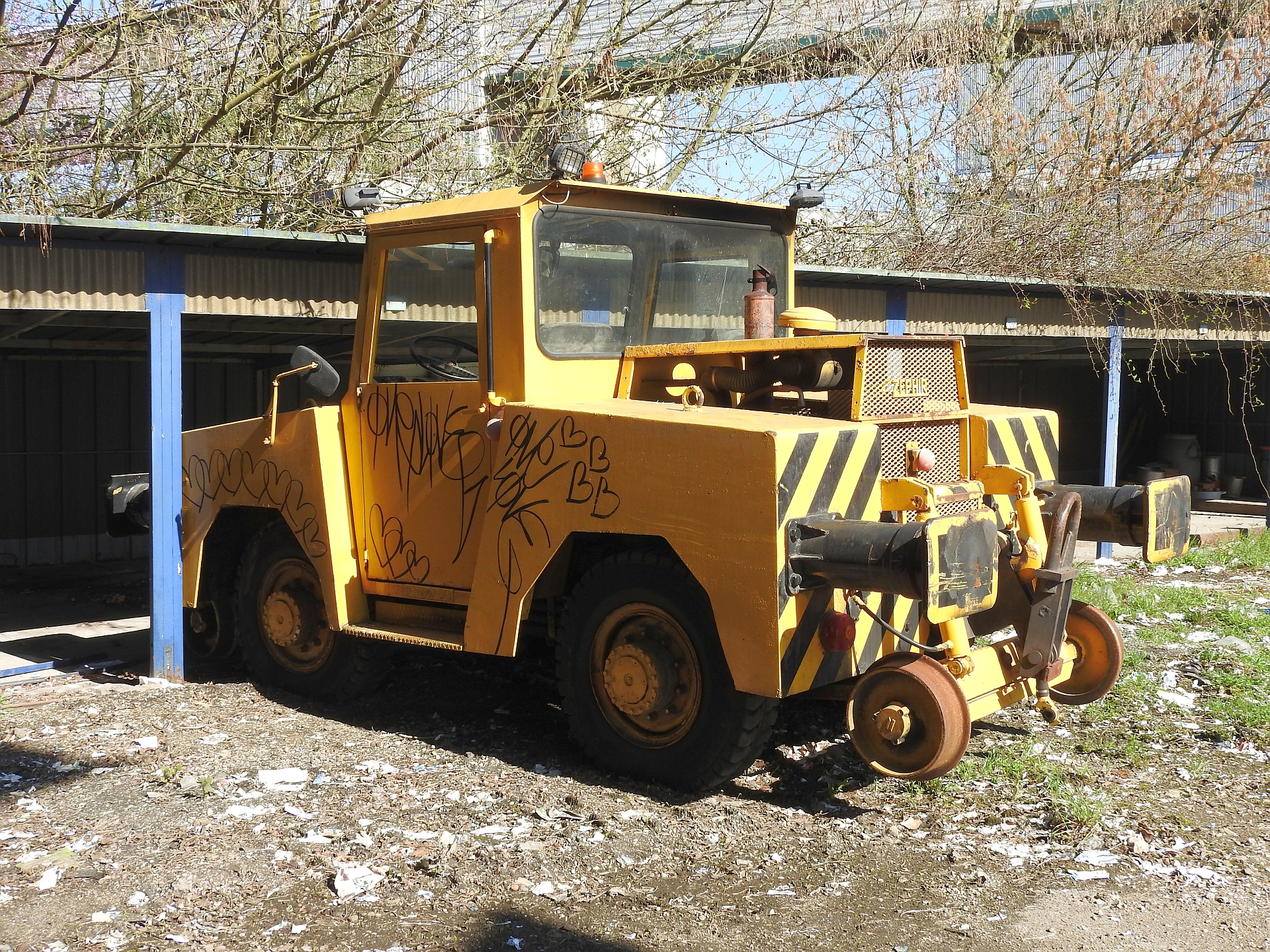 Zephir Loco 800 (Zephir 782/1988), Strasbourg, 06.04.2018